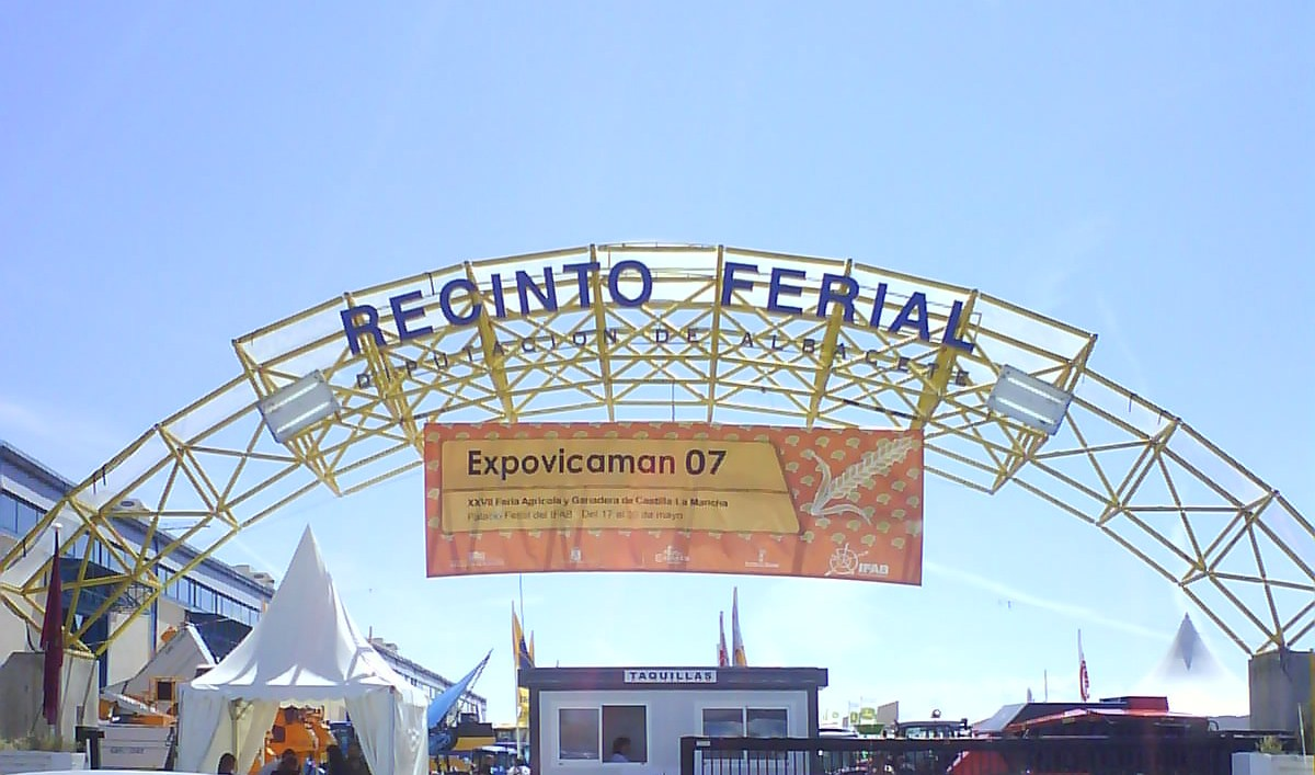 Entrada principal a la feria agrícola y ganadera de Castilla-La Mancha "Expovicaman", celebrada en el Palacio del IFAB de Albacete.